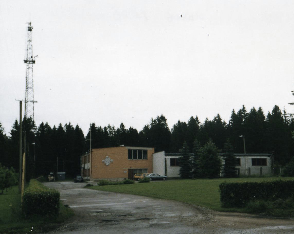 Здание городской электросети Тапа, 1997 г.